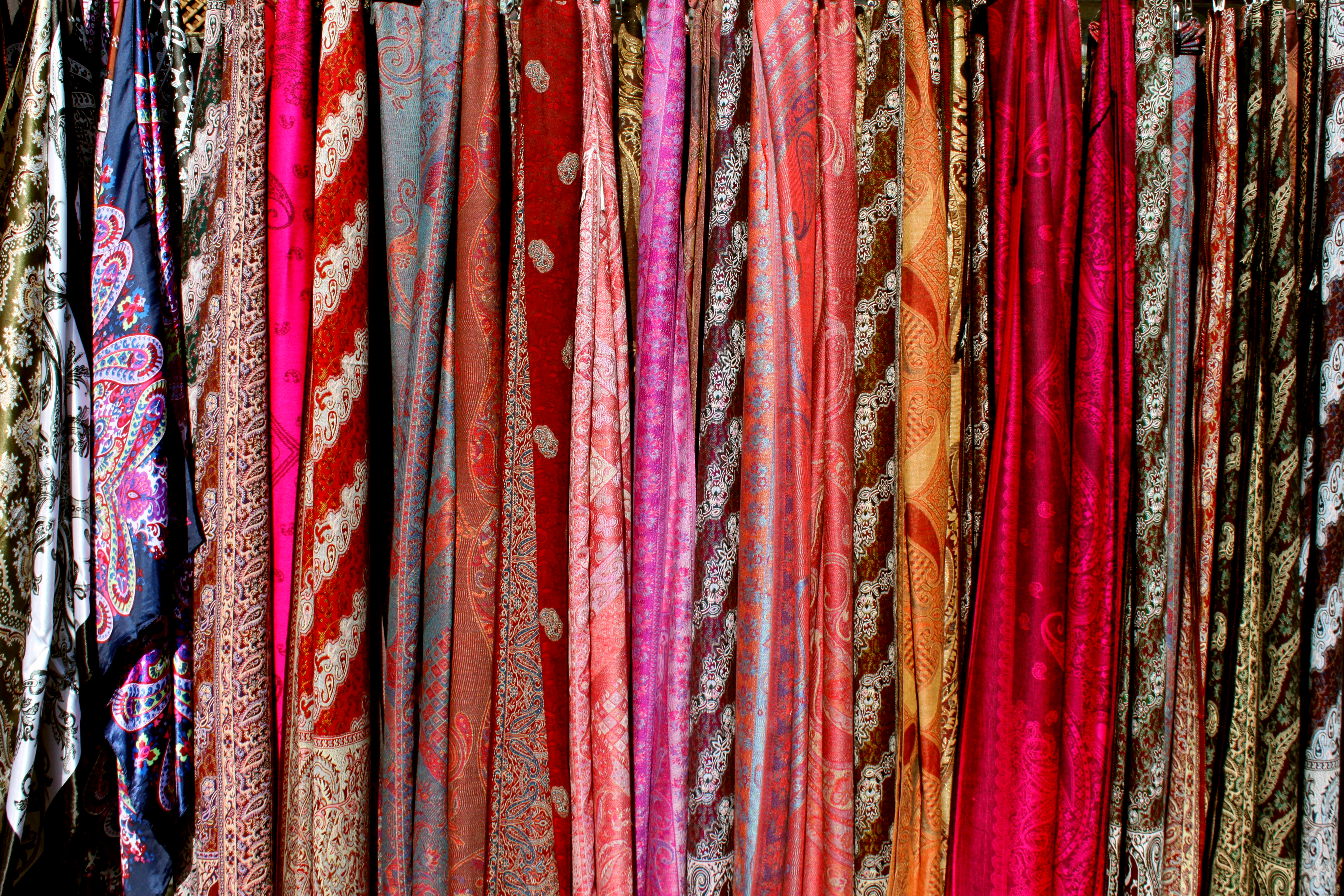 Azərbaycan ipəyindən kəlağayılar